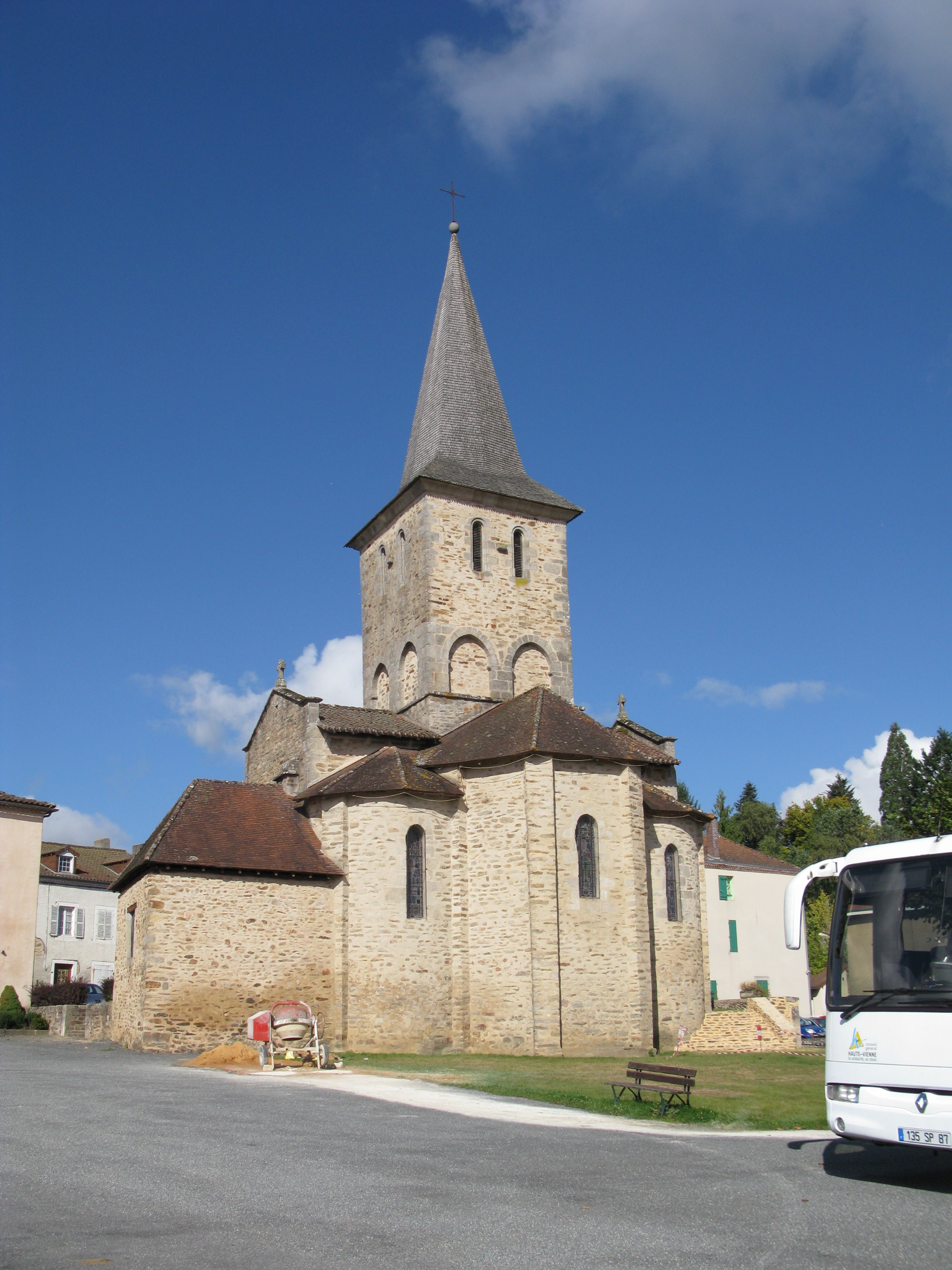 Église de Dournazac